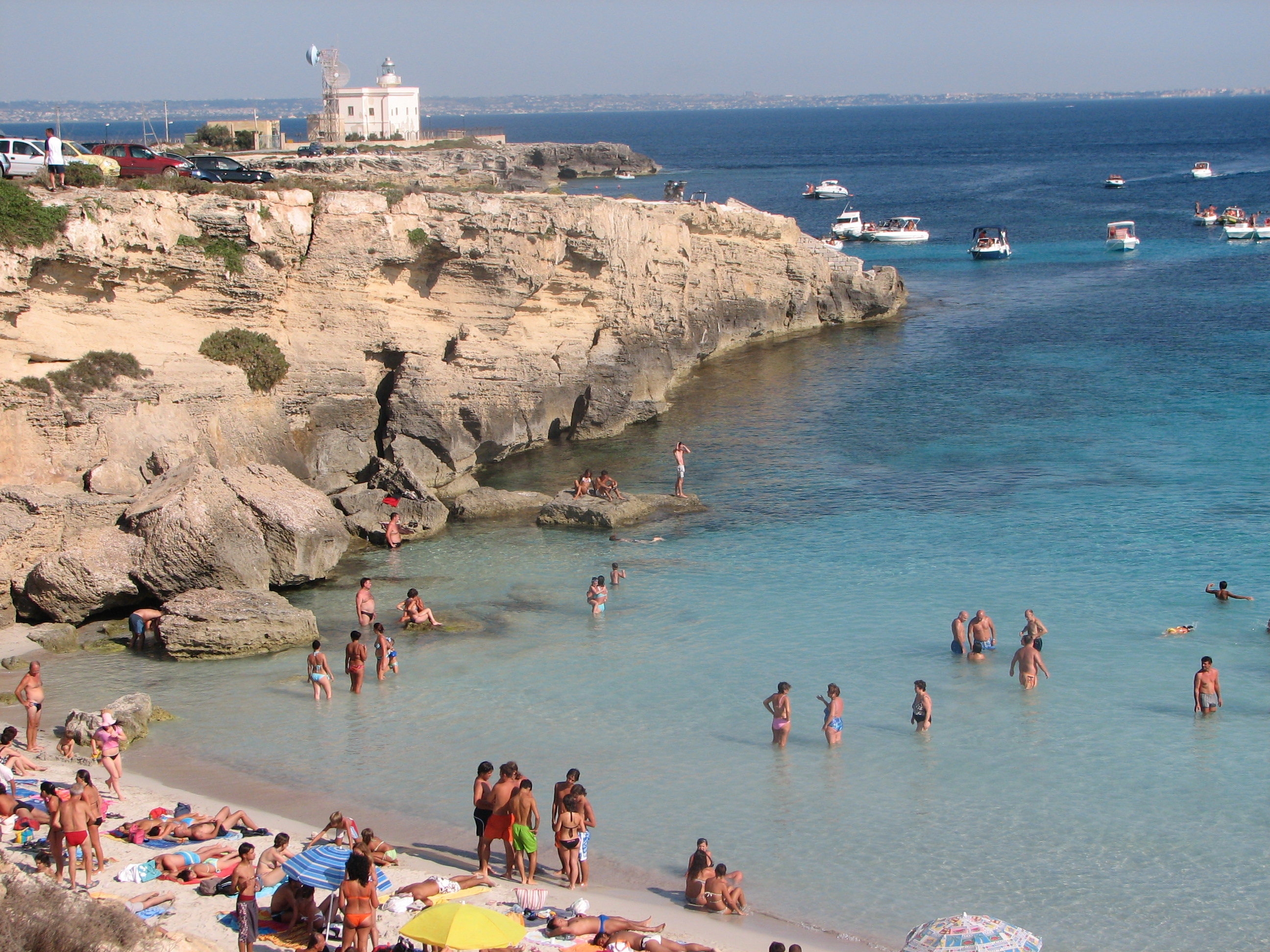 Plaża Favignana